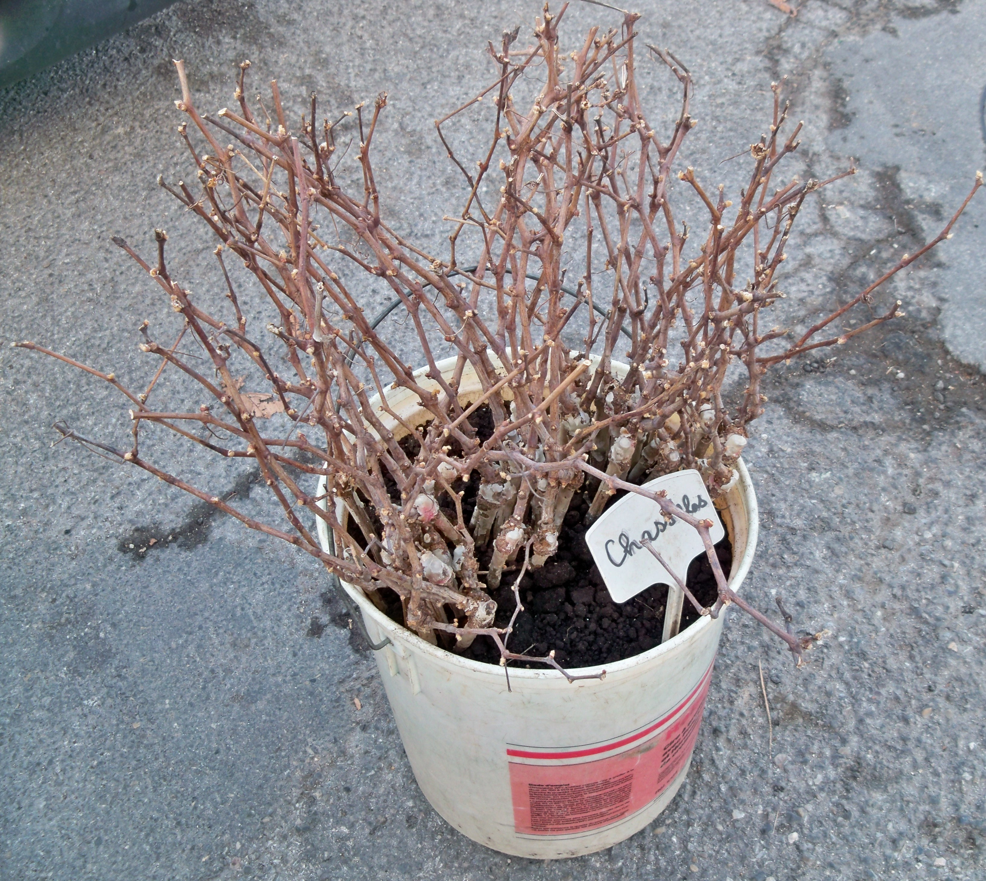 plant de vigne Chasselas